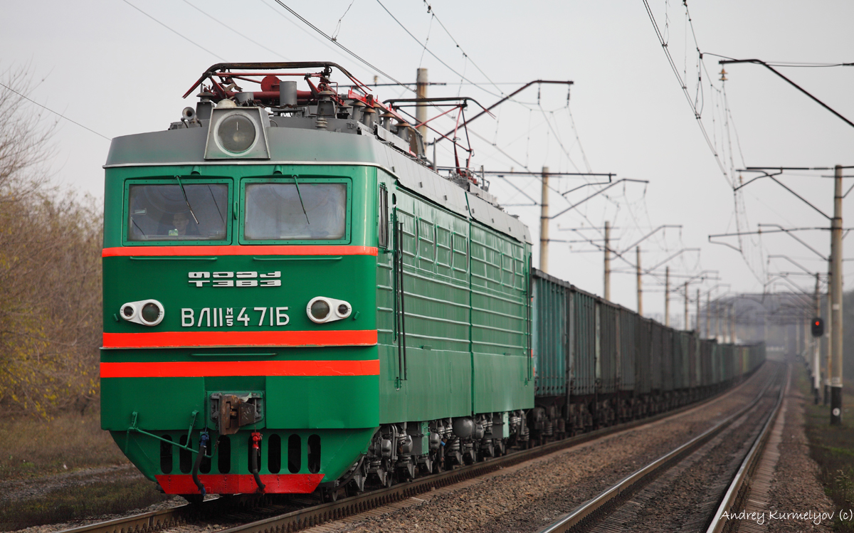 ВЛ11М, ВЛ11М5, ВЛ11М6